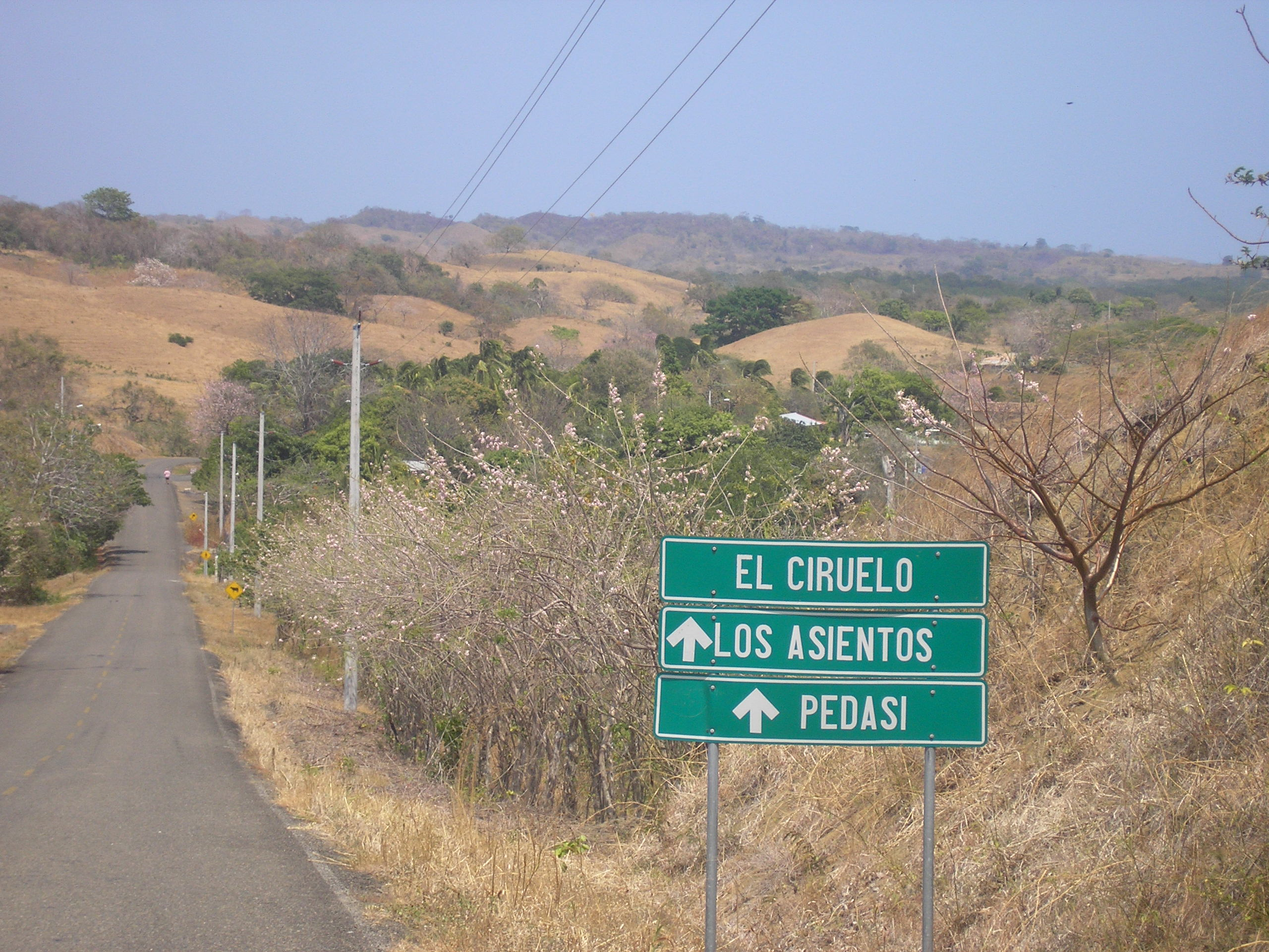 Carretera a Pedasí, Azuero